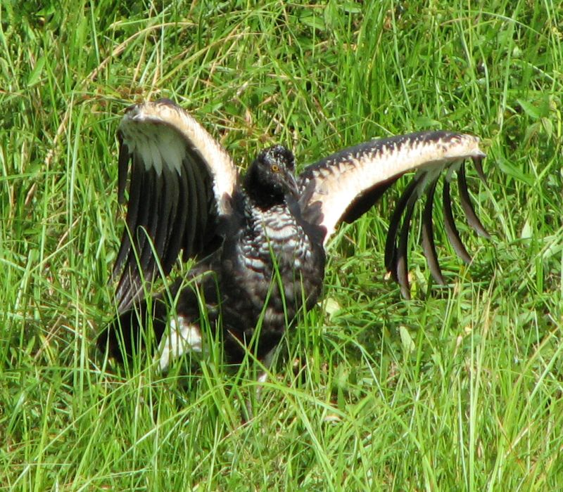 Hornwehrvogel